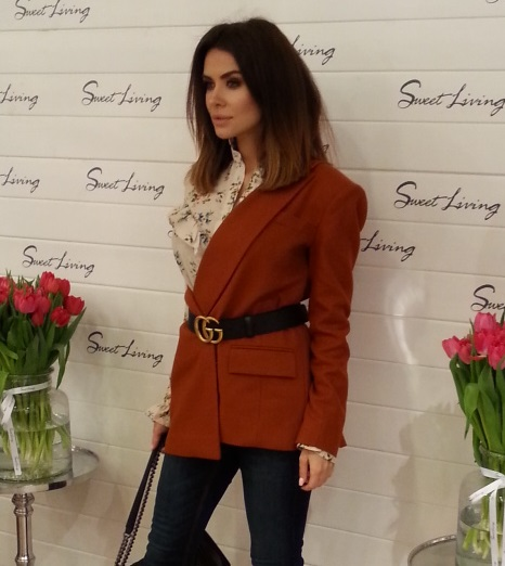 Polska celebrytka i modelka Natalia Siwiec w 2017 roku.